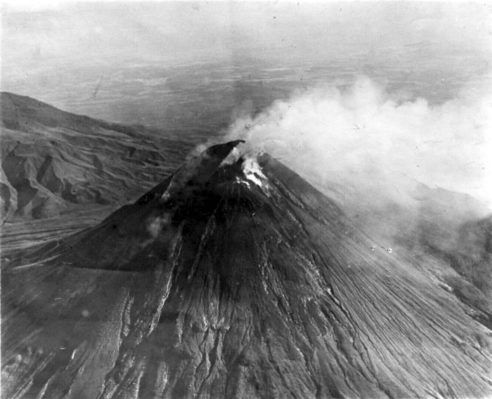 Repronegatif. Foto udara puncak Merapi tahun 1930